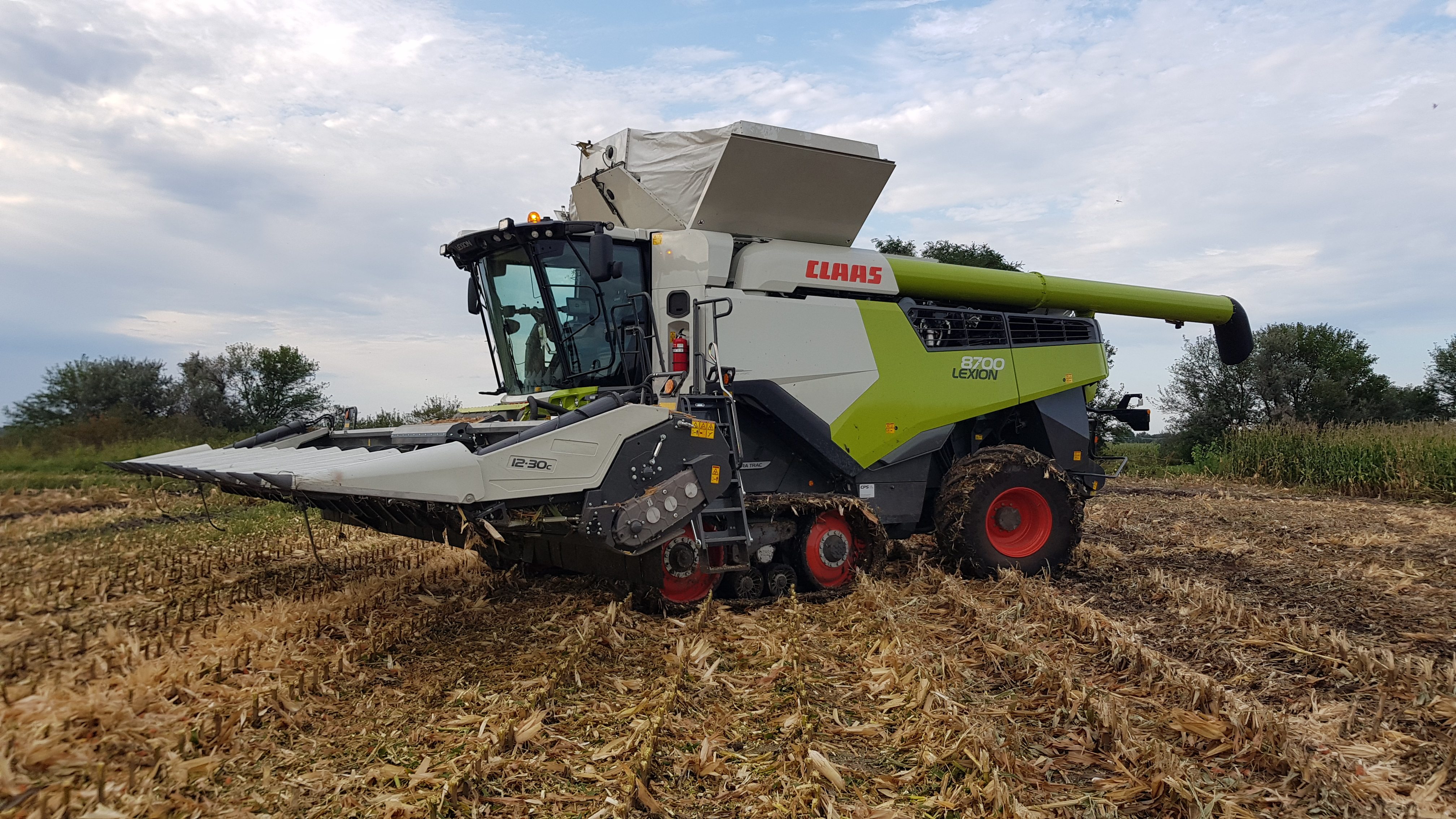 LEXION 8700 TERRA TRAC Mähdrescher mit Maispflücker im Einsatz